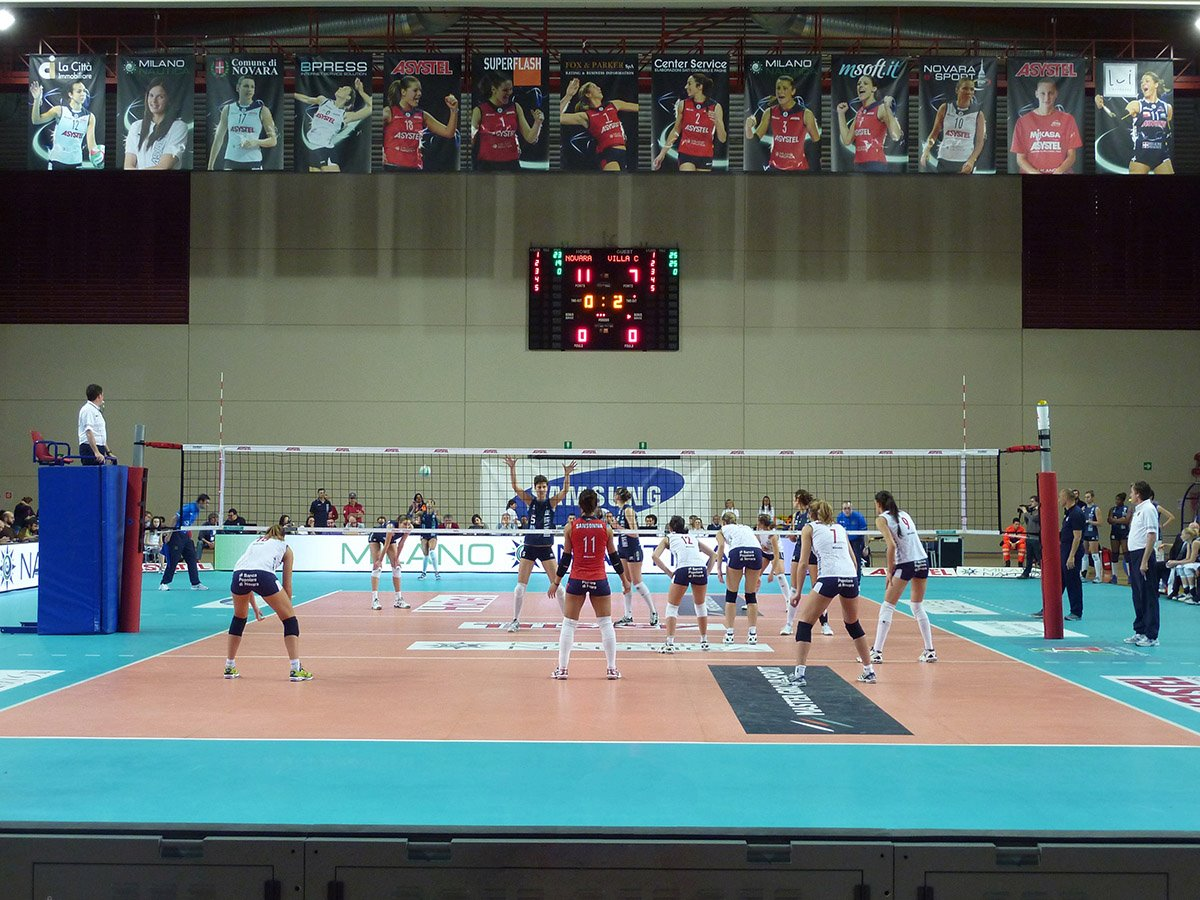 Asystel Volley - GSO Villa Cortese (04-03-2012)